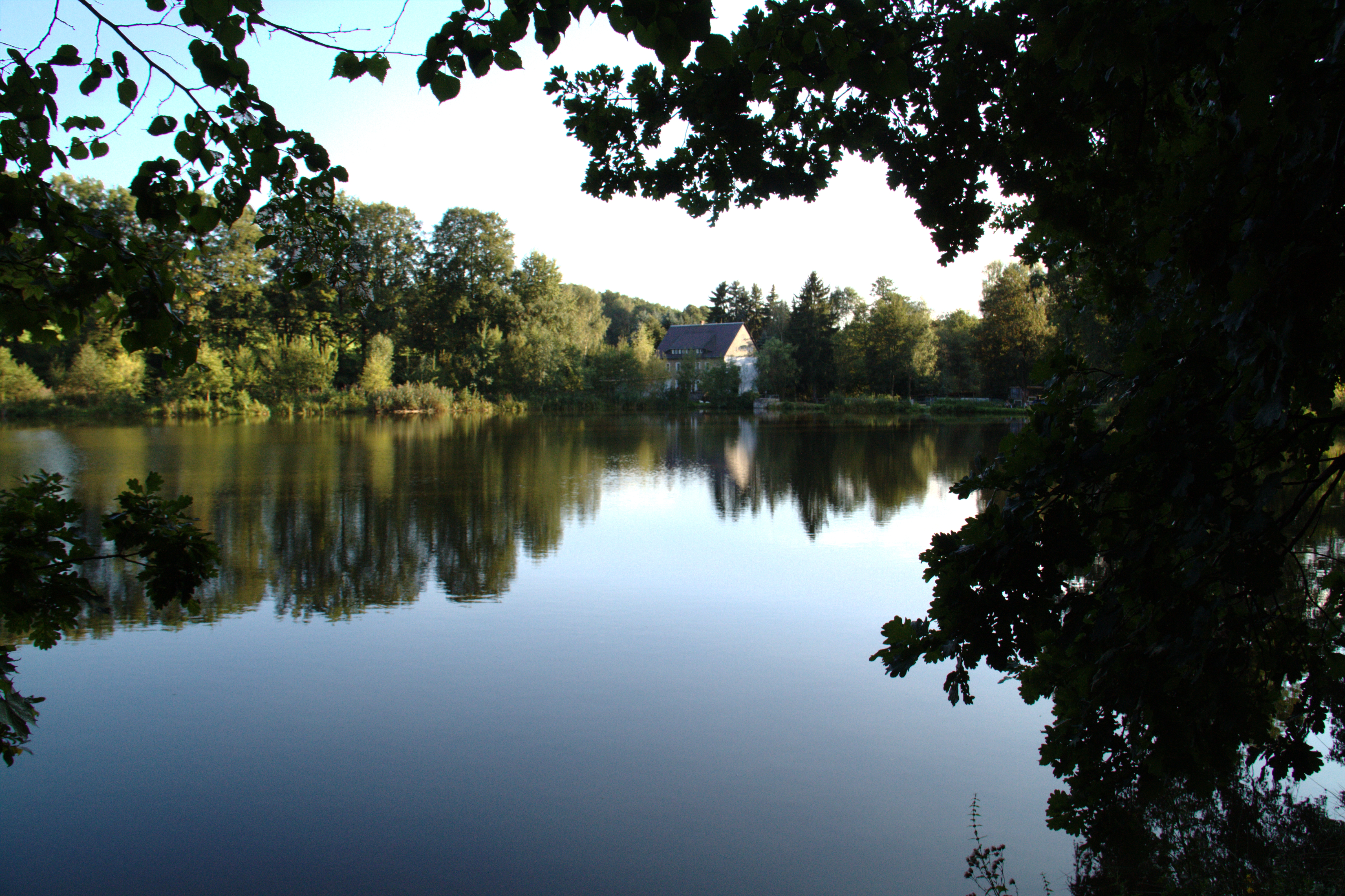 Oppach; Blick über den Gondelteich Oppach Richtung Damm-Mühle